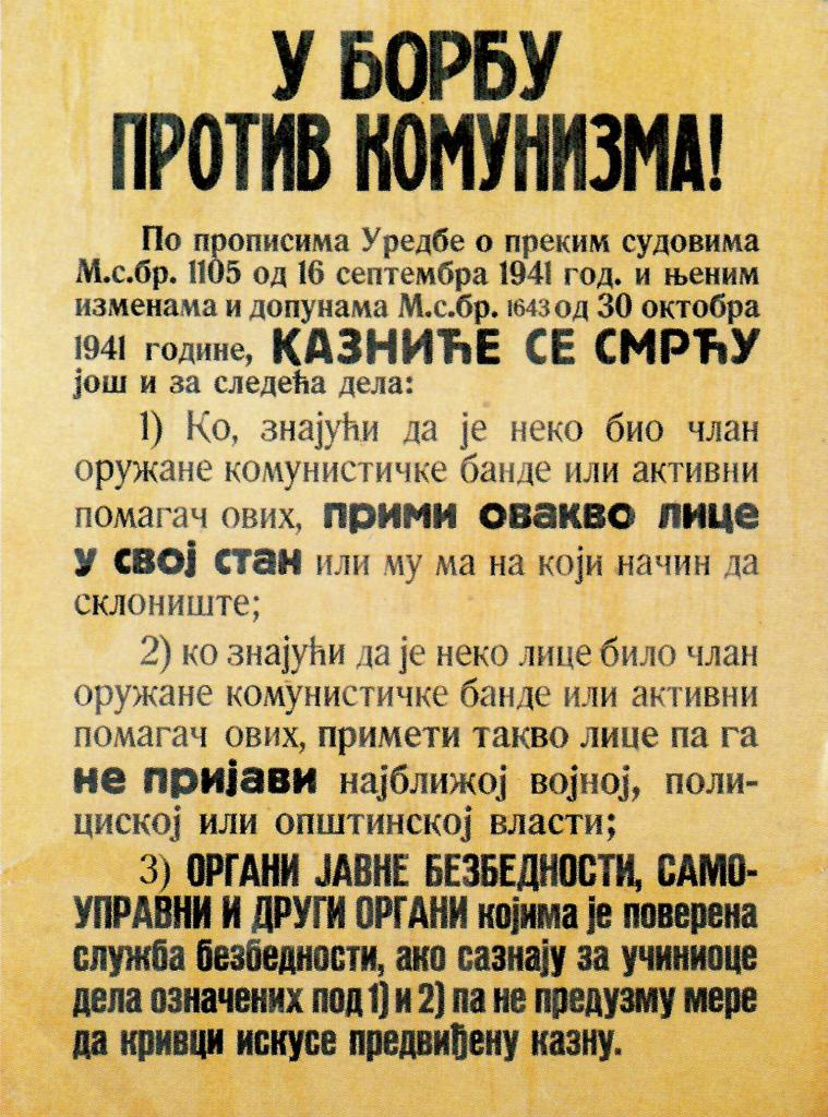 Srpskohrvatski / српскохрватски: Nemačka objava smrtnih kazni za jatake i pomagače ustanika u Srbiji, u formi propagandnog plakata o borbi protiv komunizma.